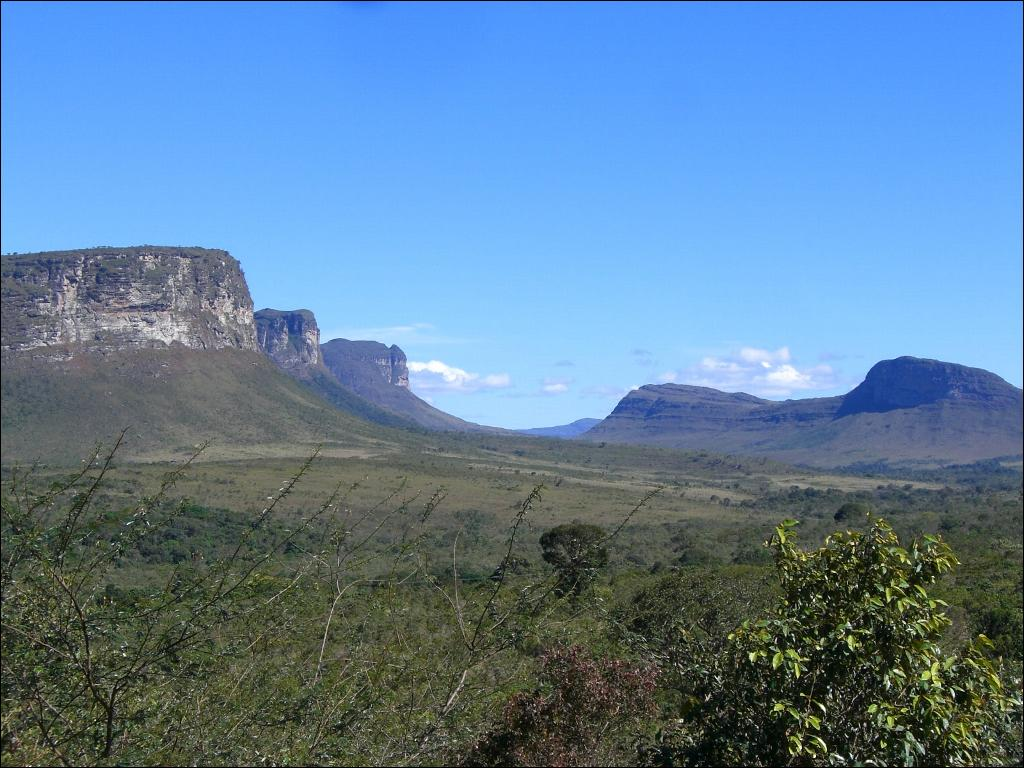 O Vale do Pati visto da BR-242, Chapada Diamantina, Bahia, Brasil.